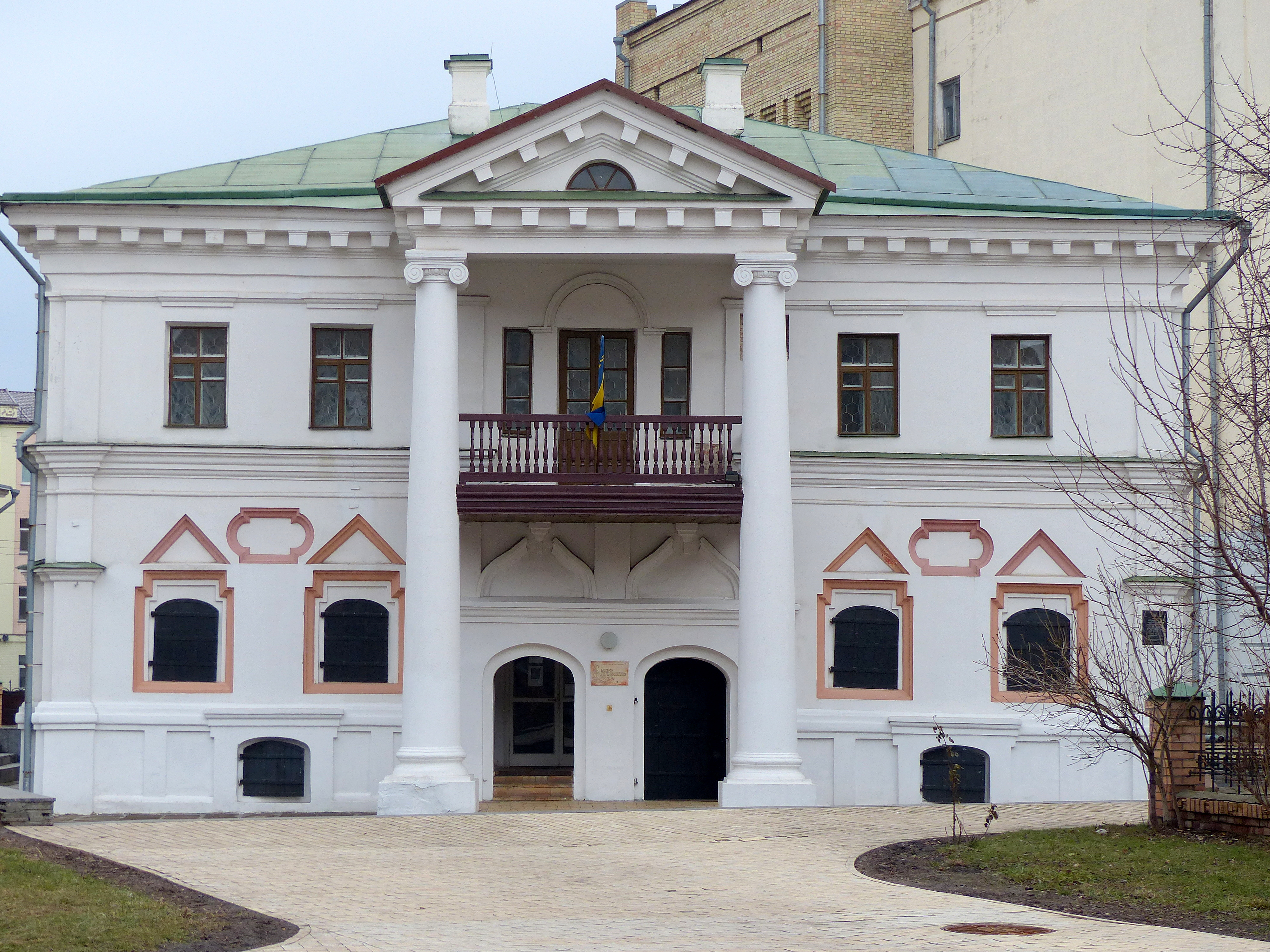 Будинок житловий («Будинок Мазепи»), Київ, Спаська вул., 16-б